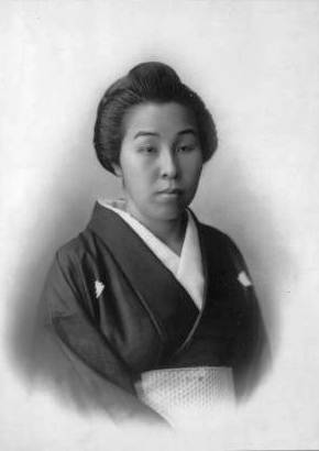 岩崎弥之助の妻、早苗。